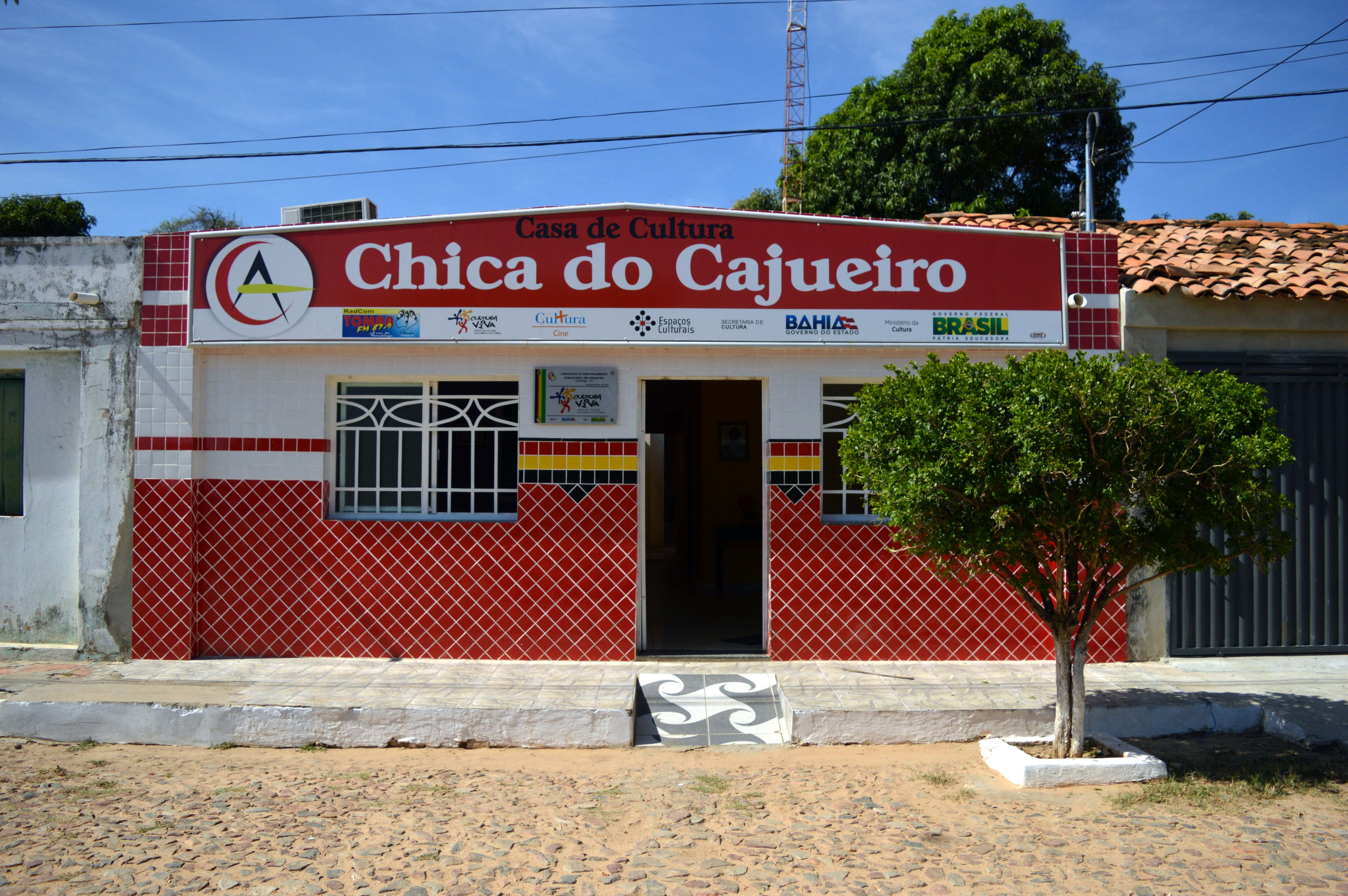 Casa de Cultura e Rádio Comunitária (Tomba FM) de Paratinga, localizada no bairro Tomba. Foto de 16 de janeiro de 2017.